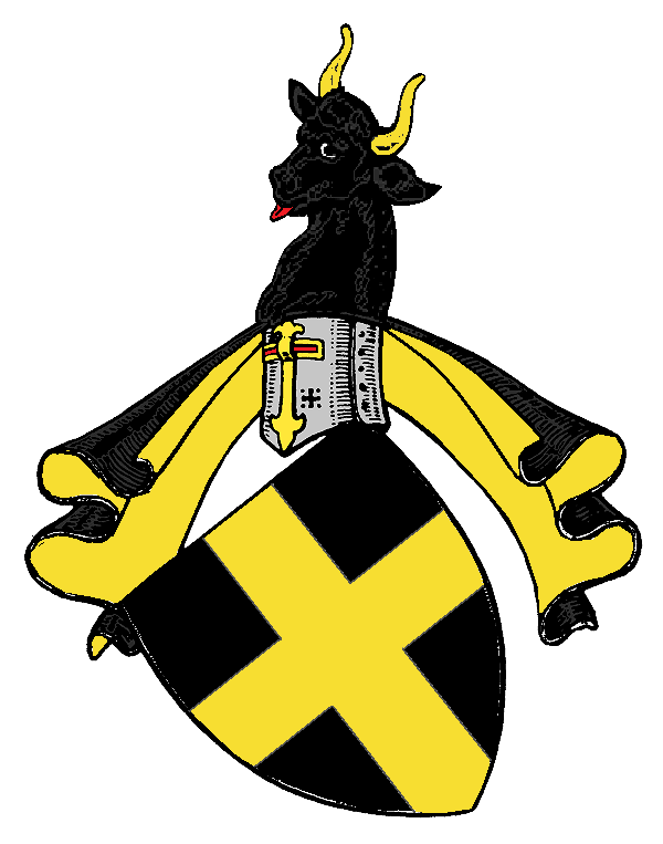 Stammwappen der Raitz von Frentz, gehören zu den ältesten Schöffen- und Rittergeschlechtern der Reichsstadt Köln. Die sichere Stammreihe beginnt mit einem Ministerialen der Abtei St. Pantaleon zu Köln, 1106–1154. Im Mittelalter stellte die Familie zahlreiche Bürgermeister der freien Reichsstadt Köln und Mitglieder ihres engeren Rats, der so genannten Richerzeche. Das älteste erhaltene Siegel mit dem Kreuzwappen datiert vom 20. Januar 1289 des „Theodericus dictus Raitze miles, civis Colon“ und seiner Söhne.